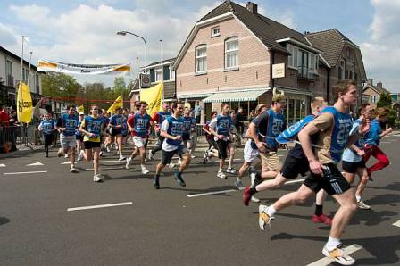 Deelnemers Batavierenrace, eigen werk, 24 april 2004. Barchem.